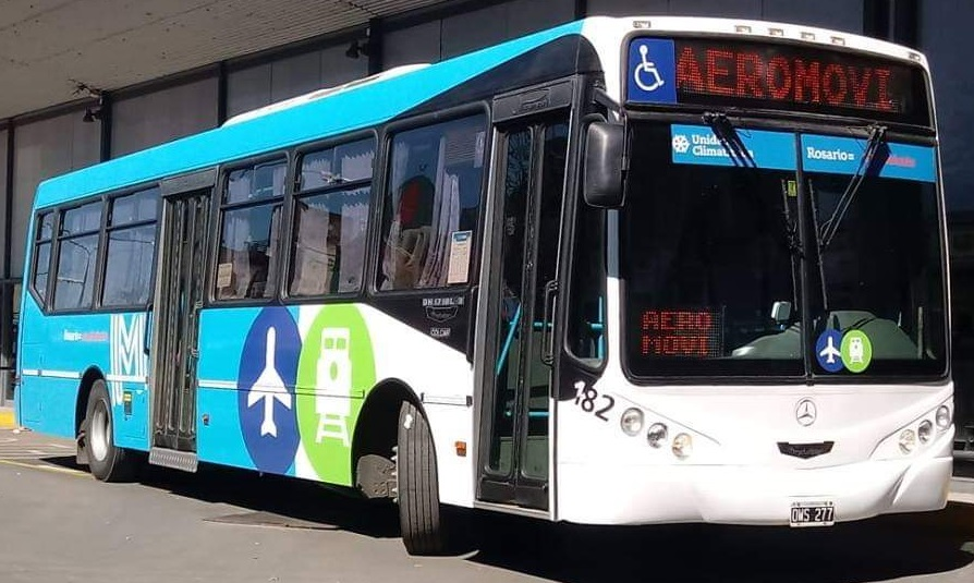 Mercedes-Benz de la línea Aeromovi, en la Terminal de Omnibus Mariano Moreno